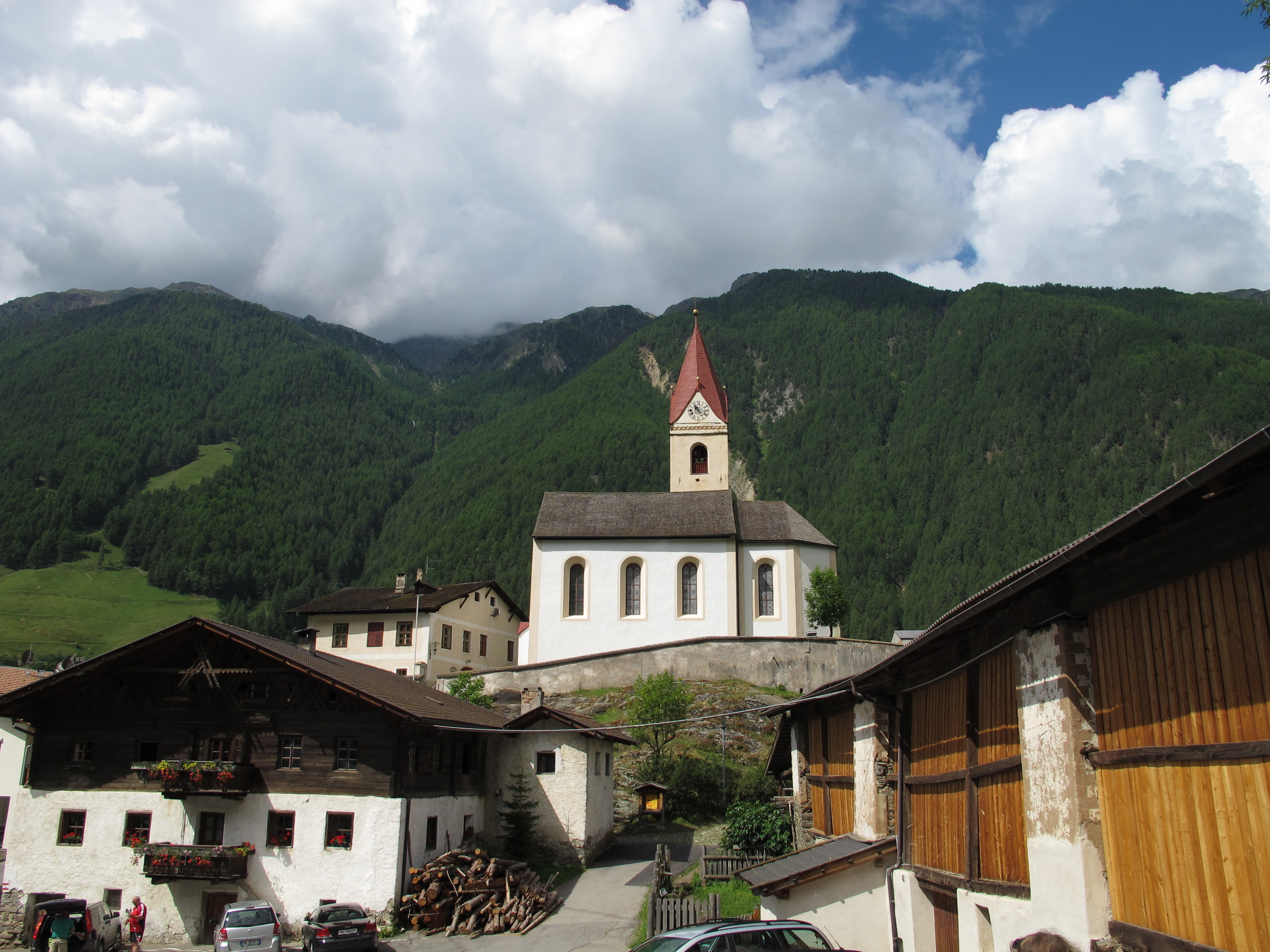 St. Katharina in Katharinaberg im Schnalstal (Südtirol): Außenansicht